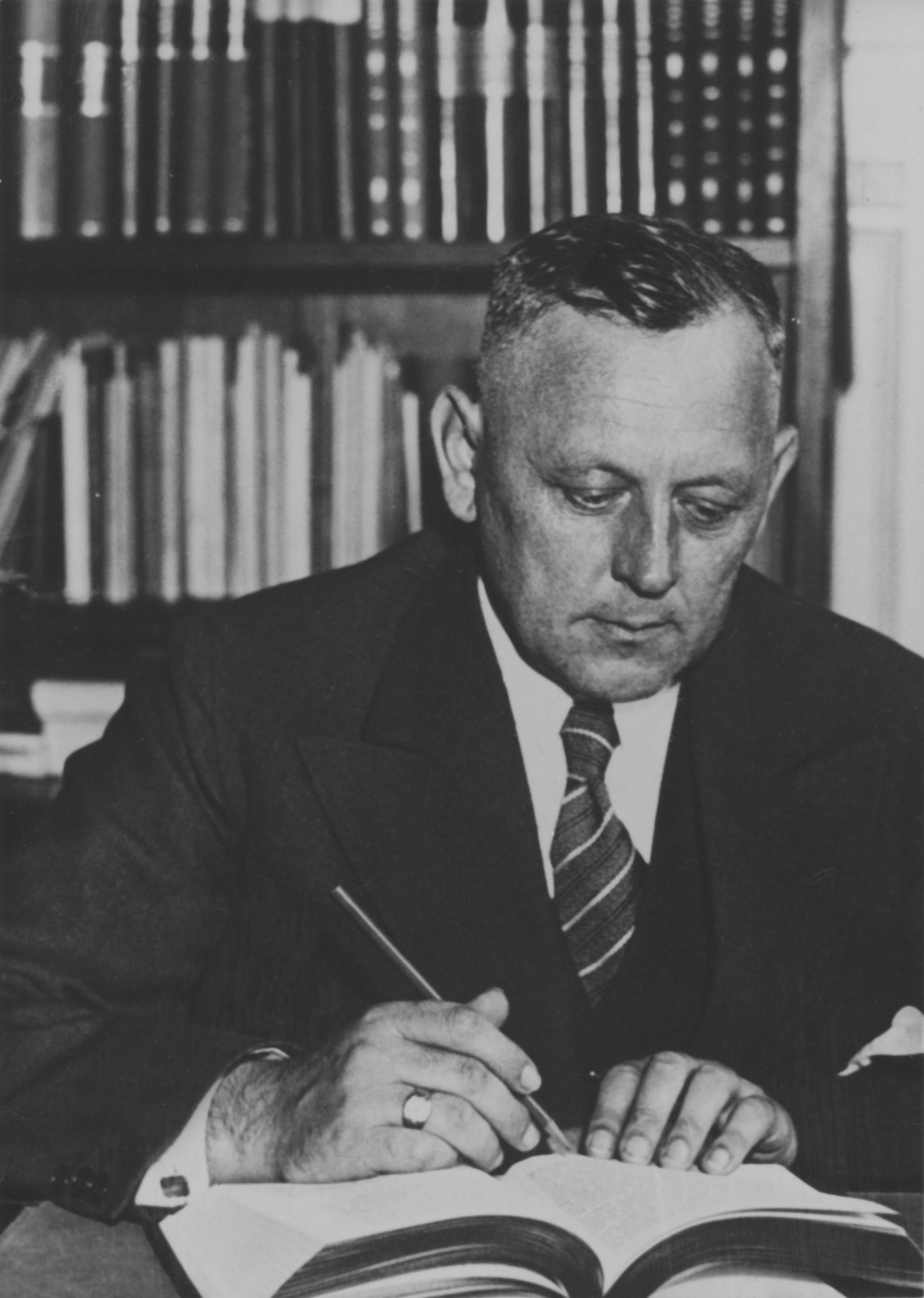 Fritz Wächtler, gauleiter van de Beierse Ostmark, zal Nederland bezoeken.